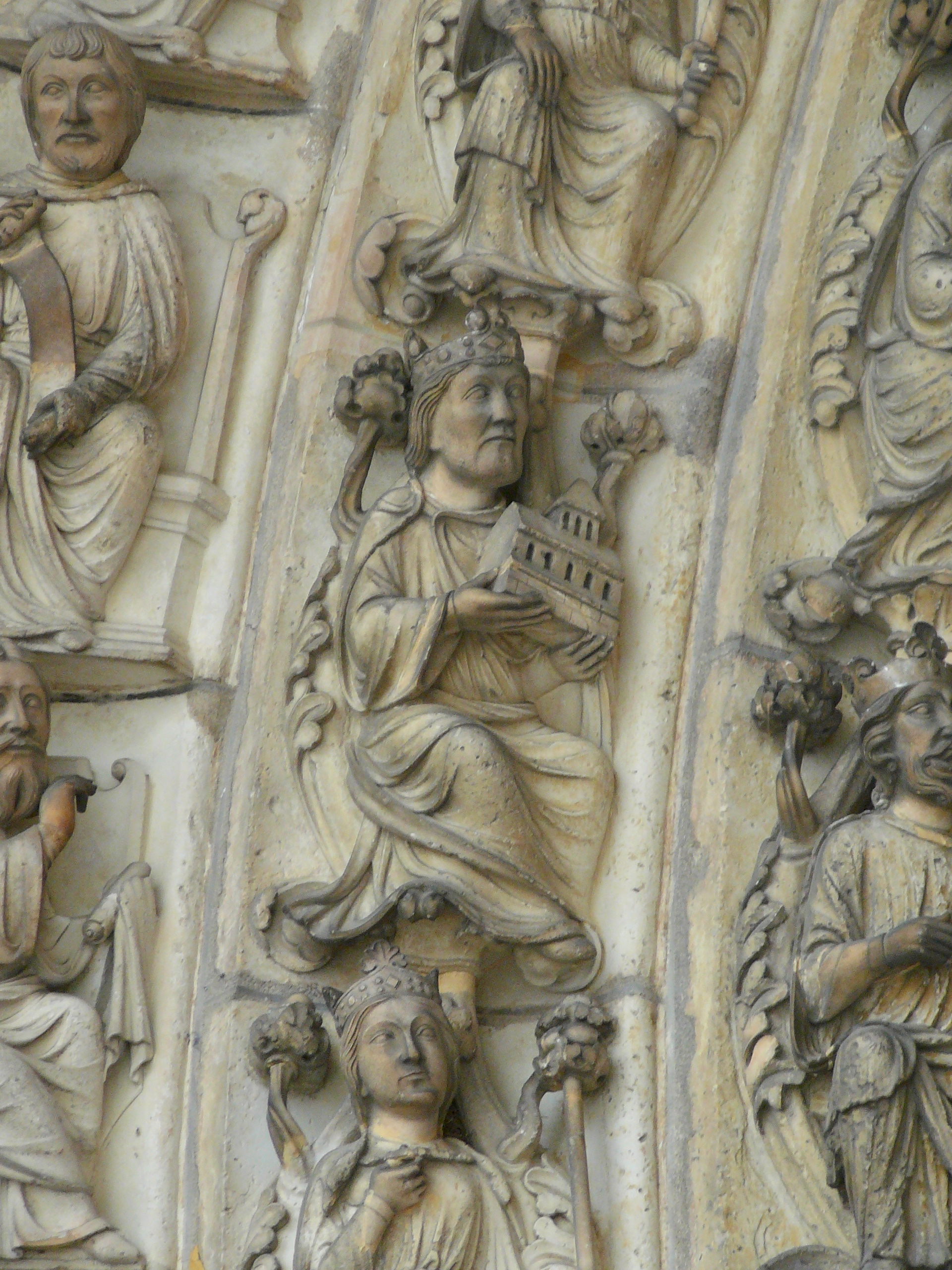 Arbre de Jessé, Salomon portant dans ses mains le Temple. Voussures du portail central de la cathédrale de Laon, France.